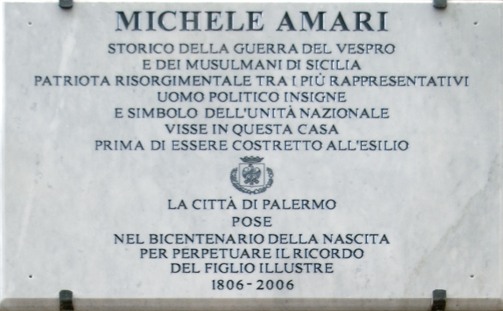 Targa posta nel 2006 dalla Città di Palermo in memoria di Michele Amari. Palazzo Isnello, Palermo, Italia.